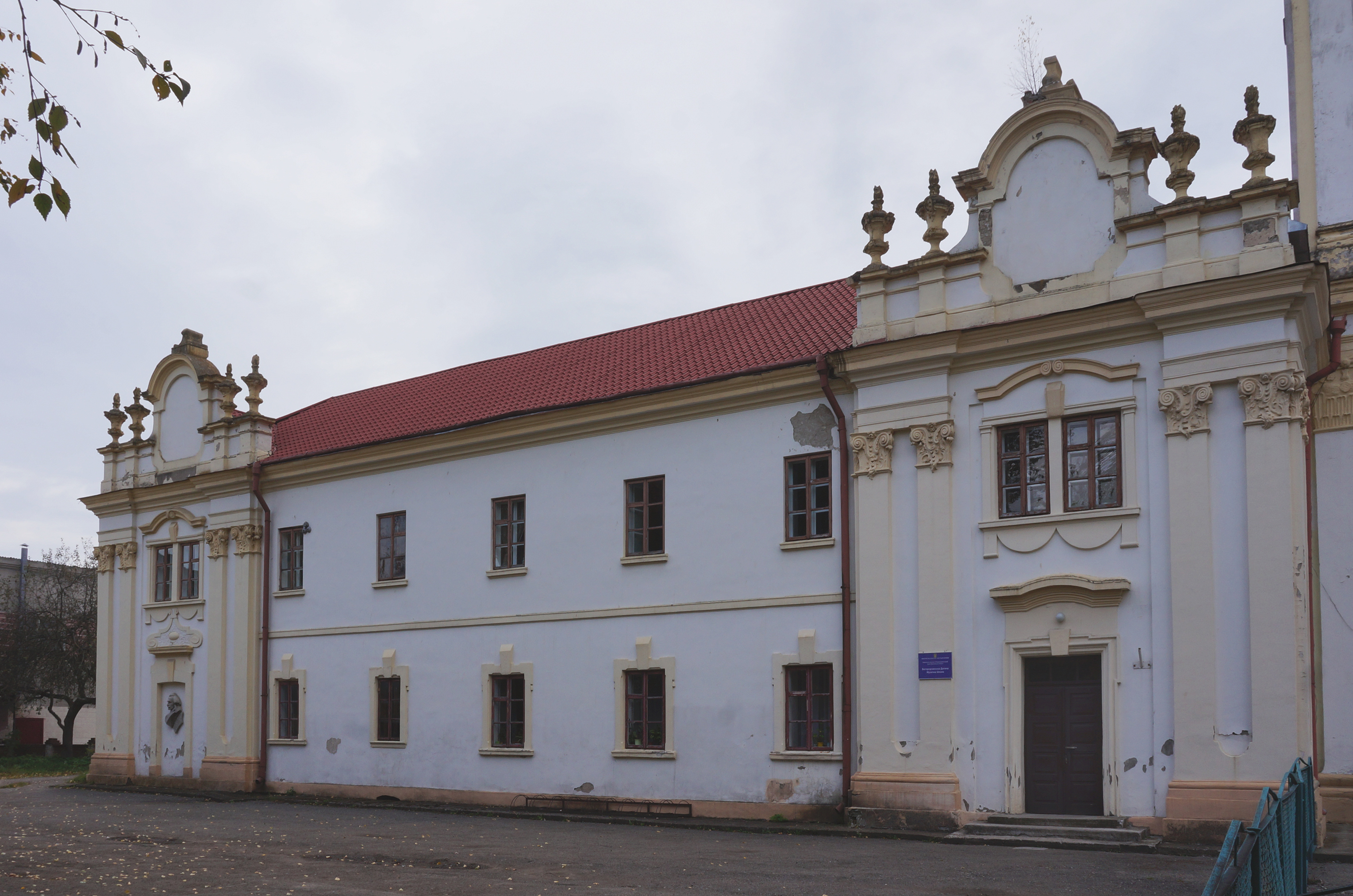 Палати духовенства келії, смт Богородчани, вул. Шевченка, 61